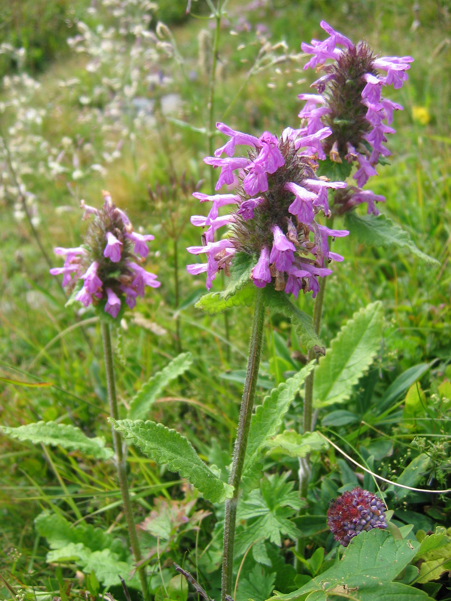 Stachys pradica : Lac de la Grande Sitre - Belledonne - France (38)